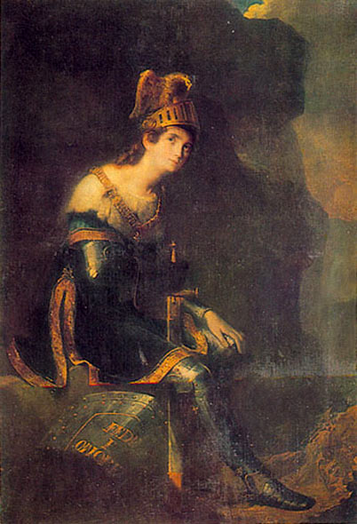 Бруни Ф.А. Портрет княгини З.А. Волконской в костюме Танкреда Холст, масло. ГРМ. Ж-3409 188 х 130 см. На обороте наклейка Таврической выставки (Петербург 1905); на подрамнике графитным карандашом: Волконского Сергиевская, 7. Поступил: в 1926 из БООП*; ранее - в собрании М. С. Волконского (Ленинград) Изображена в костюме Танкреда, главного героя одноименной оперы Д. Россини, которая ставилась в салоне княгини в Риме. Литографированный портрет 3. А. Волконской в виде Жанны Д'Арк, представляющий собой вариант картины ГРМ**, княгиня послала в 1826 А. С. Пушкину с указанием, что он выполнен „с Бруни" (d'aprés Bruni). В Каталоге 1980 - не ранее 1820. В 1820 3. А. Волконская хвалит в письме отцу художника „картину-эскиз"; в 1822 картина находилась в мастерской Ф. А. Бруни; в декабре 1824 Н. И. Тургенев видел ее в Риме и рассматривал как законченное произведение. У А. В. Половцова в сводной таблице работ Бруни портрет помещается между 1820 и 1824 (Половцов 1907***, с. 124). Таким образом, датировку можно уточнить как период между 1820 и 1824.